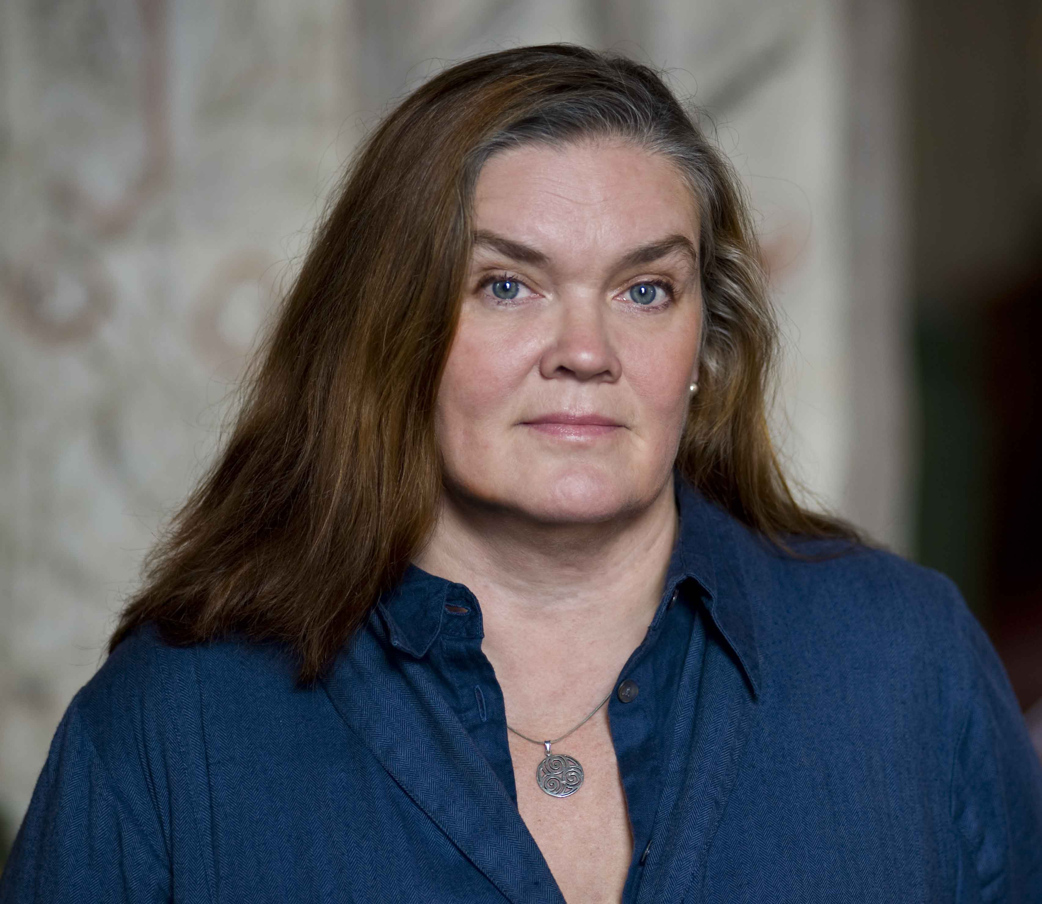 Maja Hagerman foto:Claes Gabrielson